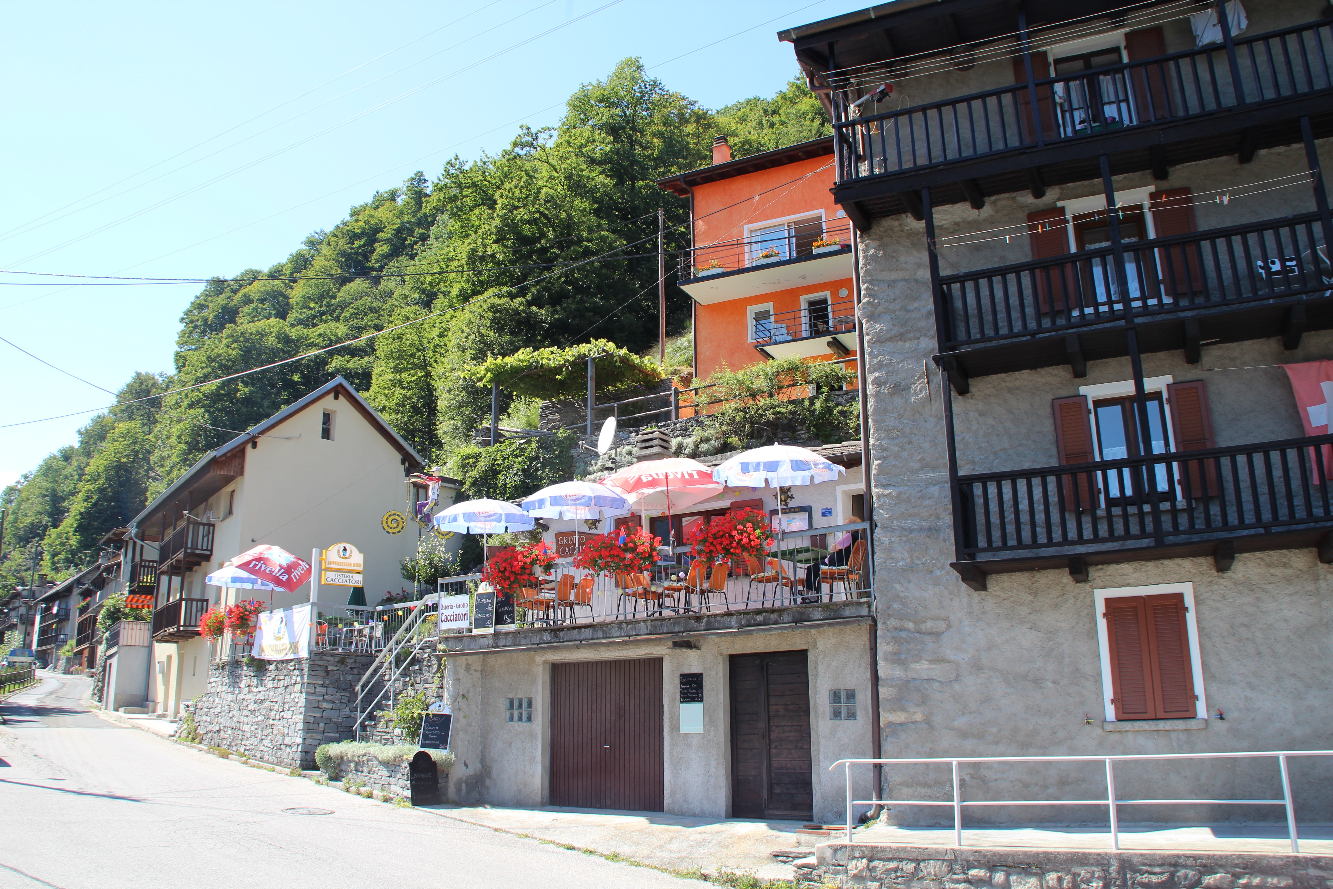 Crana